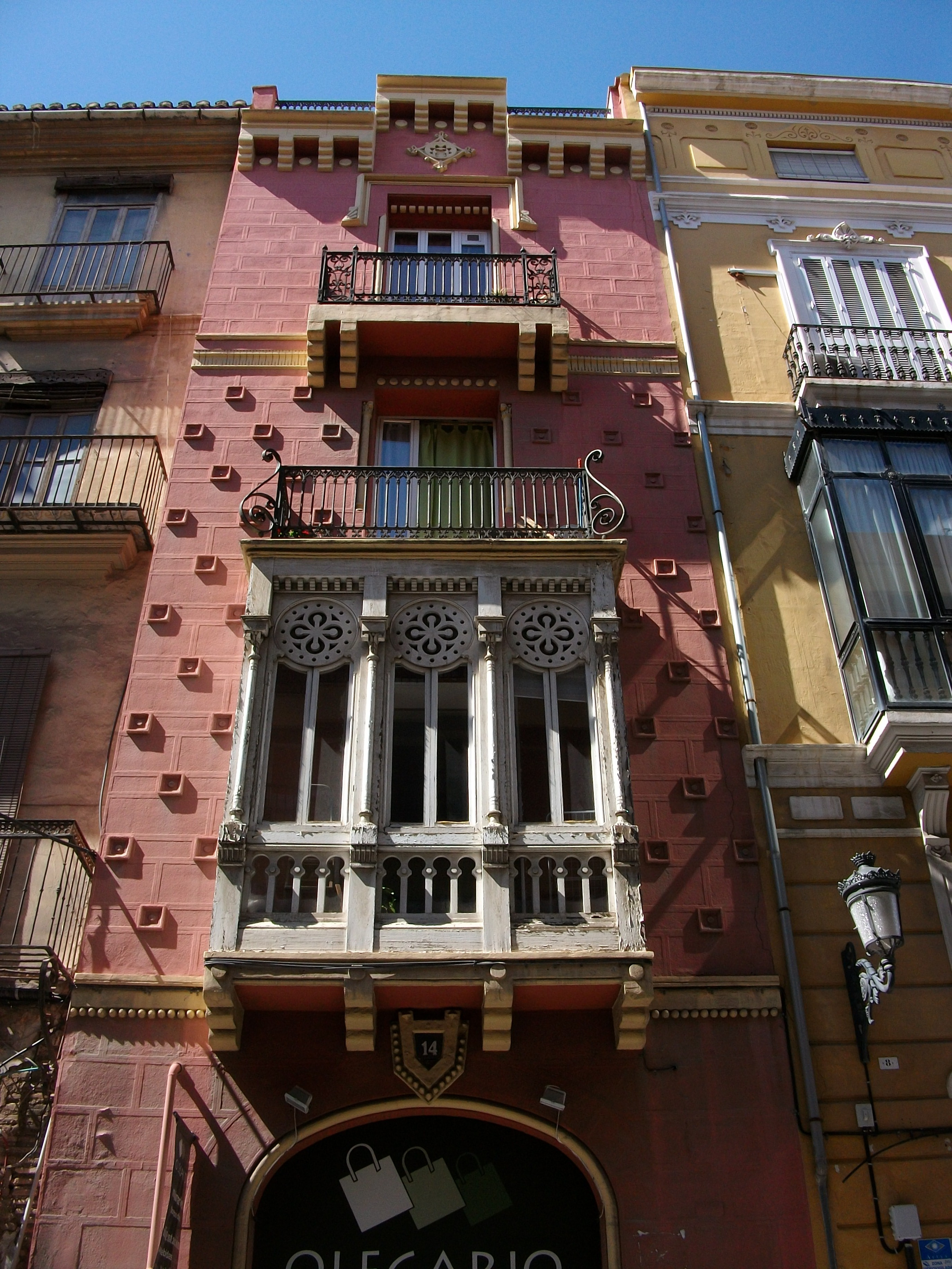 Edifici Ros Ferrer, carrer Quart 14, València. Autor, Salvador Galiana Araquistán, construït el 1891.